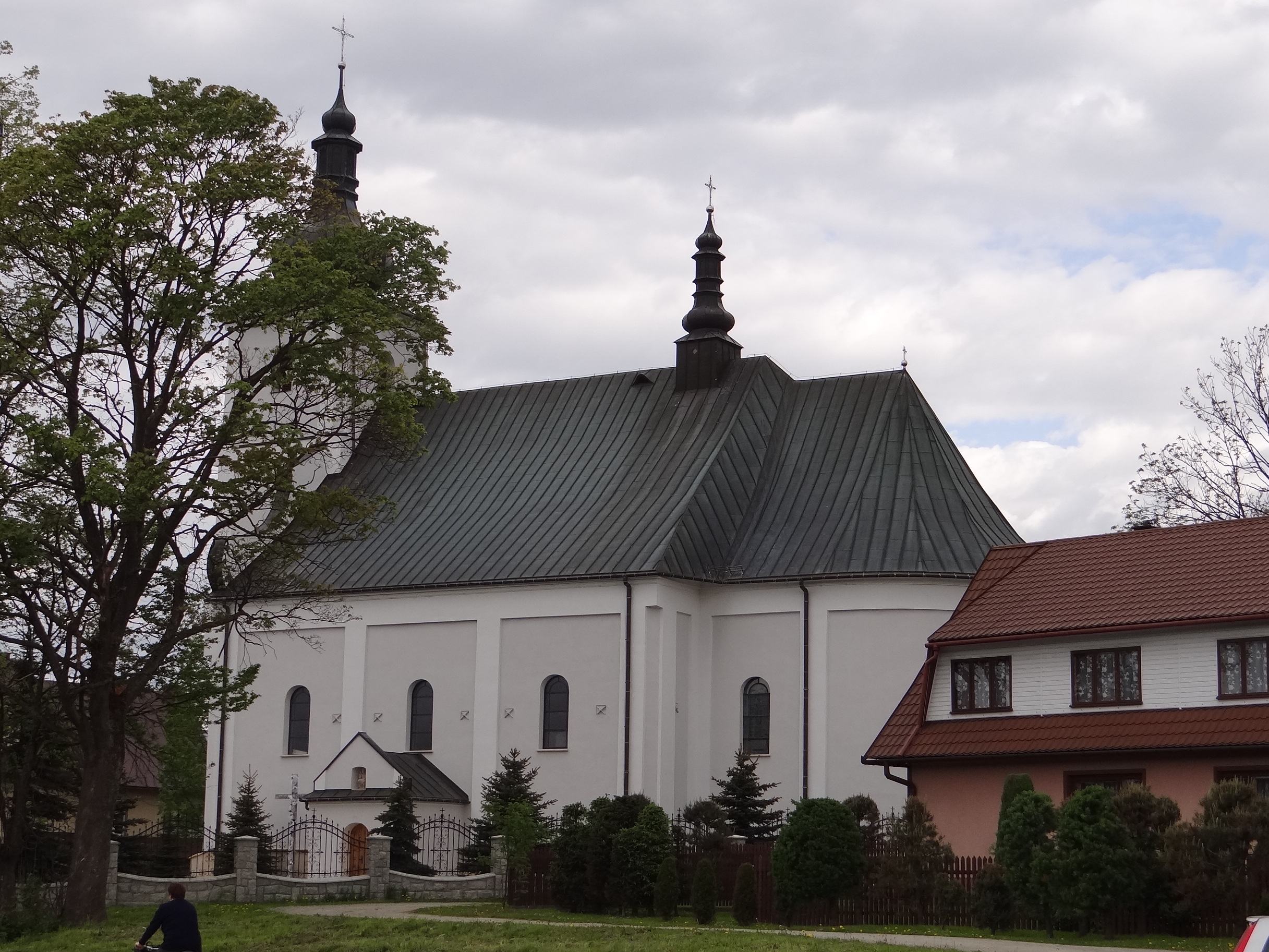 Podwilk, kościół